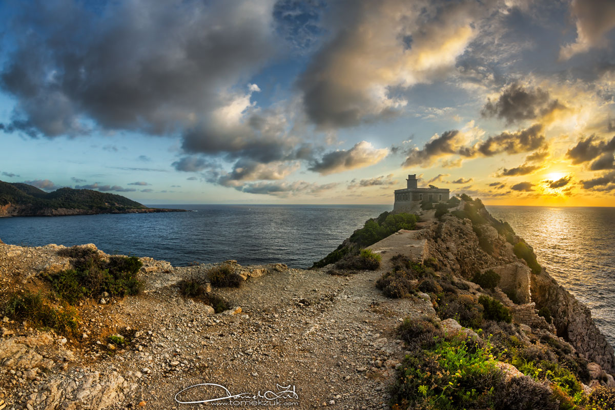 Latarnia morska Punta Grossa